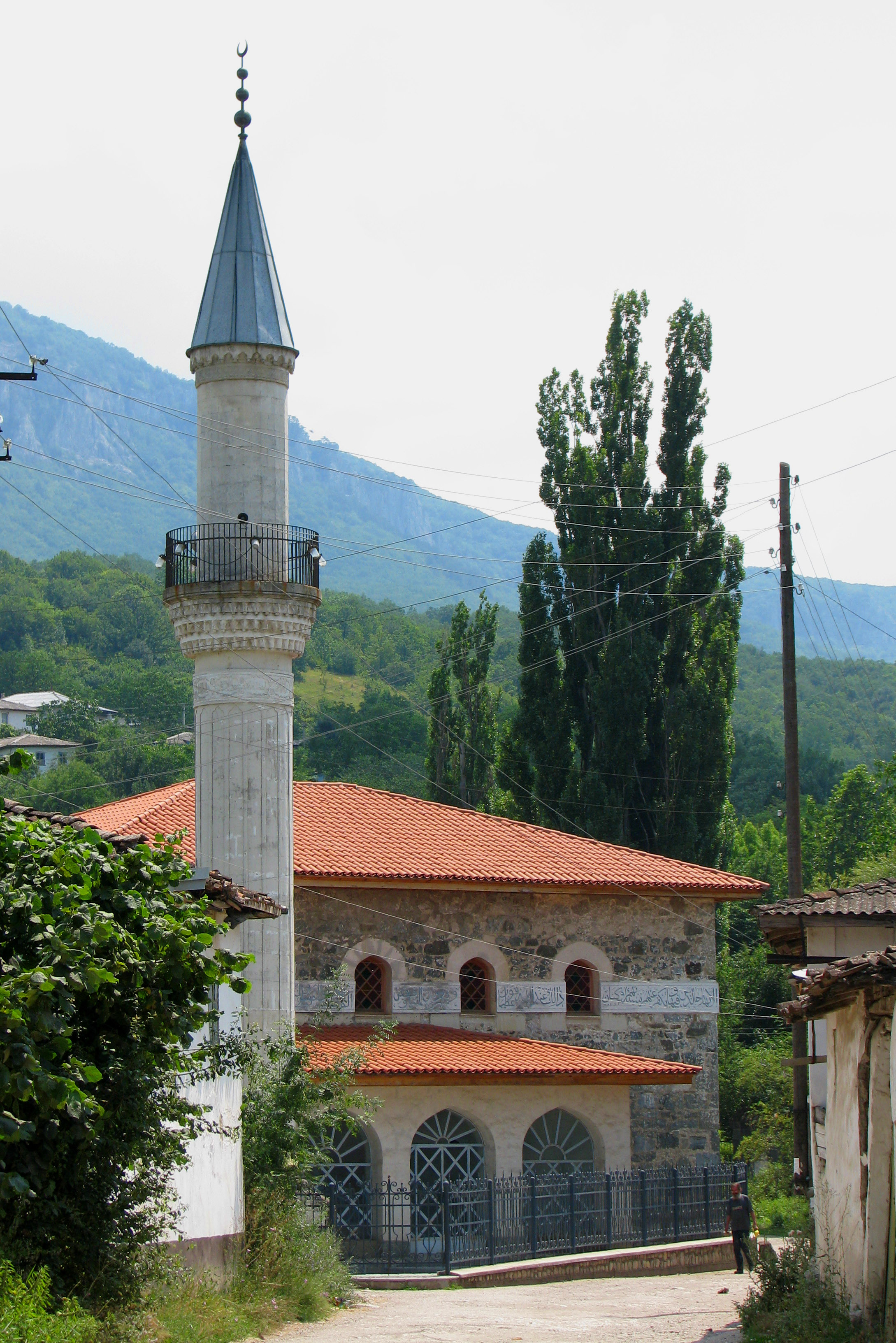 Коккоз Джами, Юсуповская мечеть, Соколиное, Крым